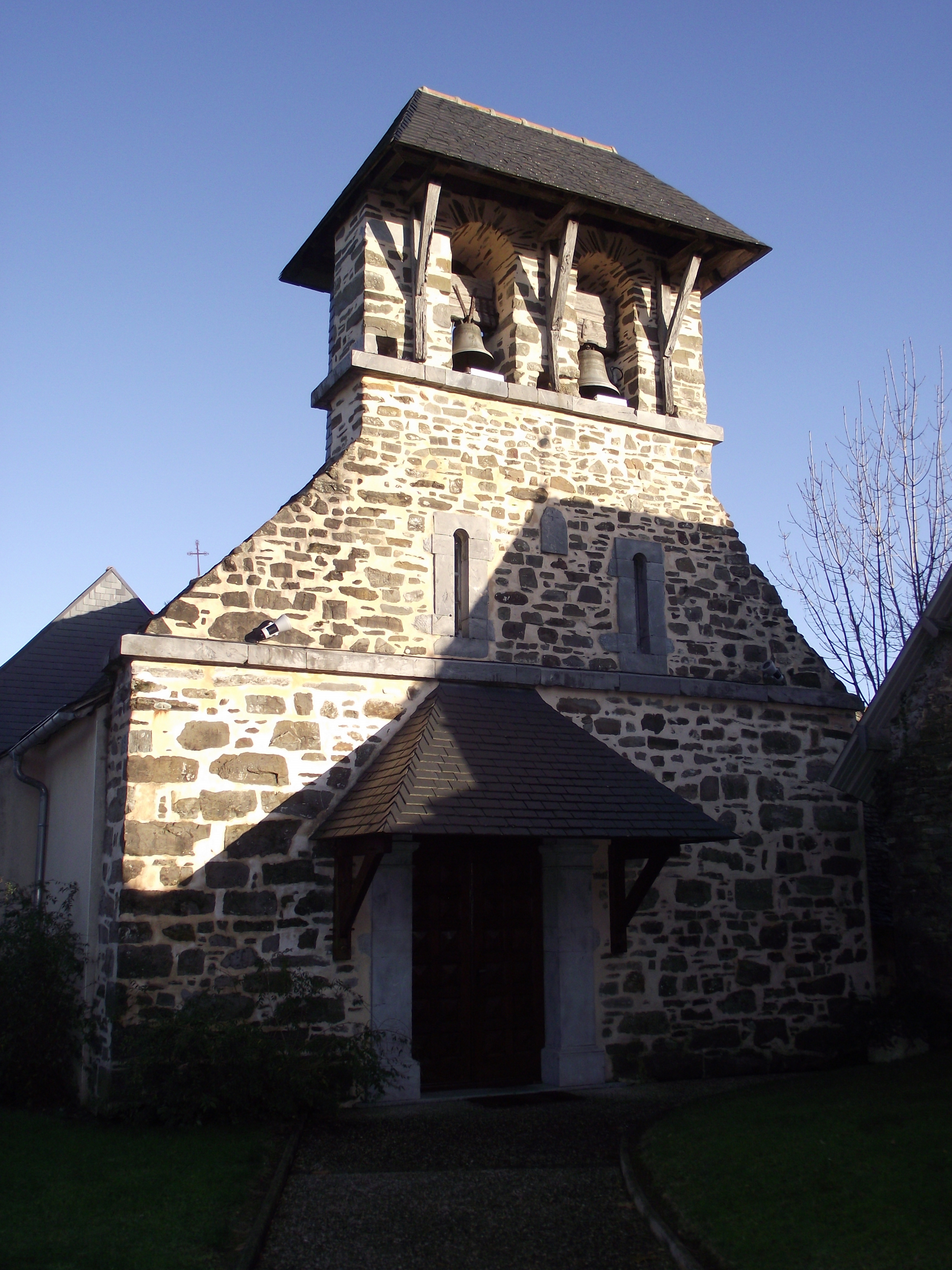 Église Saint-Martin d'Averan (Hautes-Pyrénées, France)